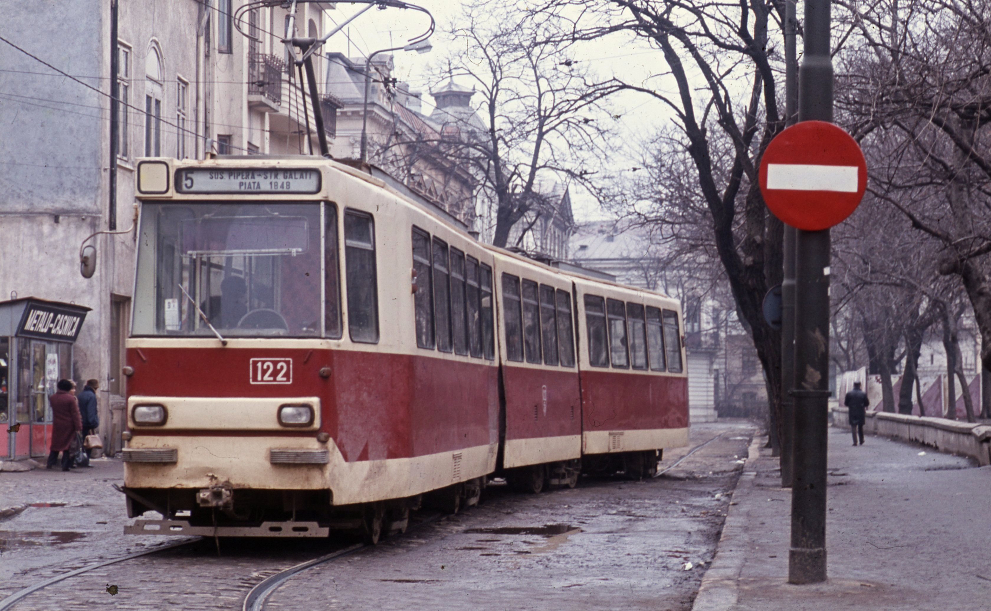 Strada Baniei a Piata Sfantul Gheorghe (Piata 1848) mellett. Location: Romania, Bucharest Tags: tram, colorful Title: Strada Baniei a Piata Sfantul Gheorghe (Piata 1848) mellett.